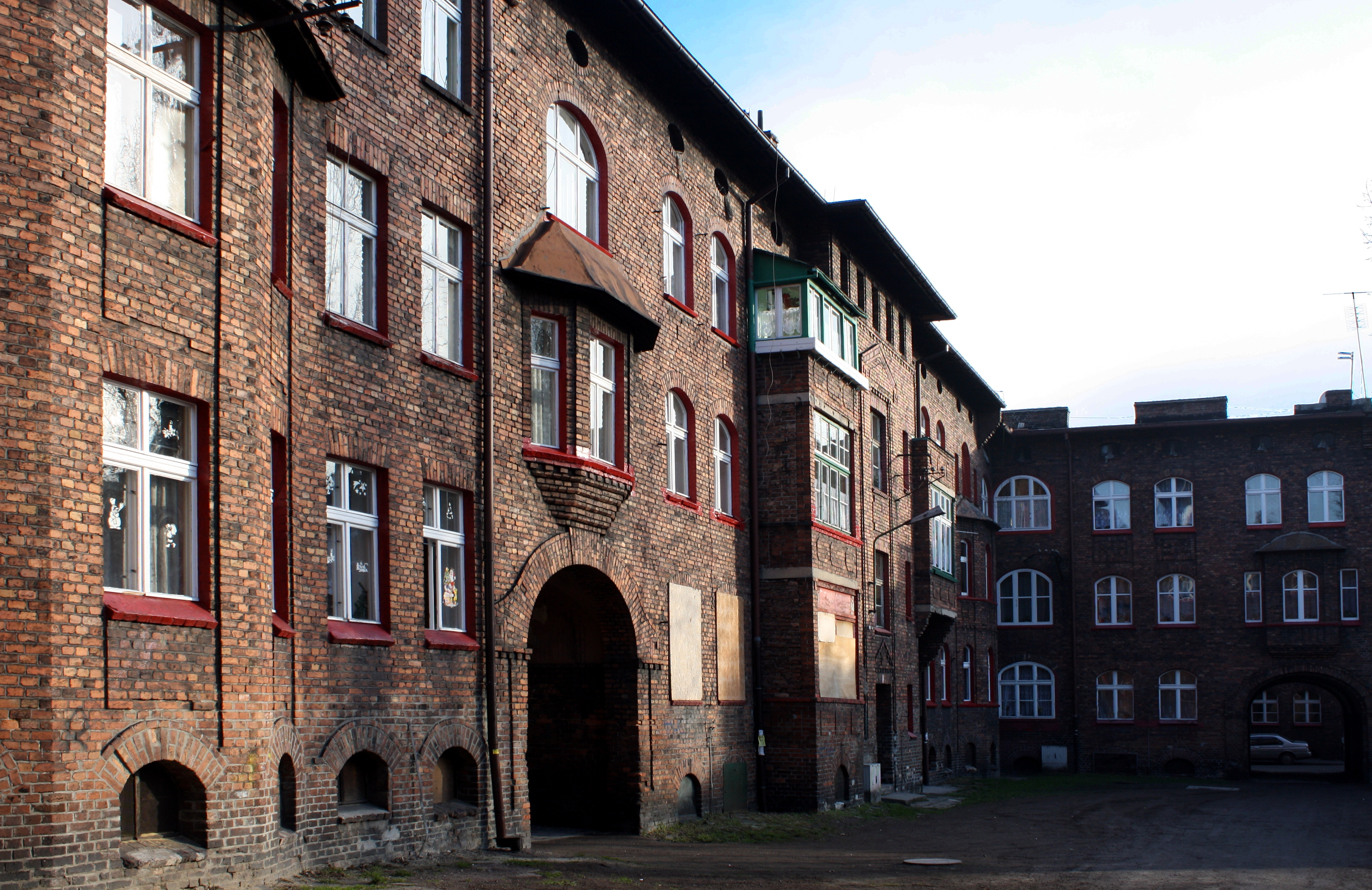 Katowice - Nikiszowiec, zabytkowe familoki